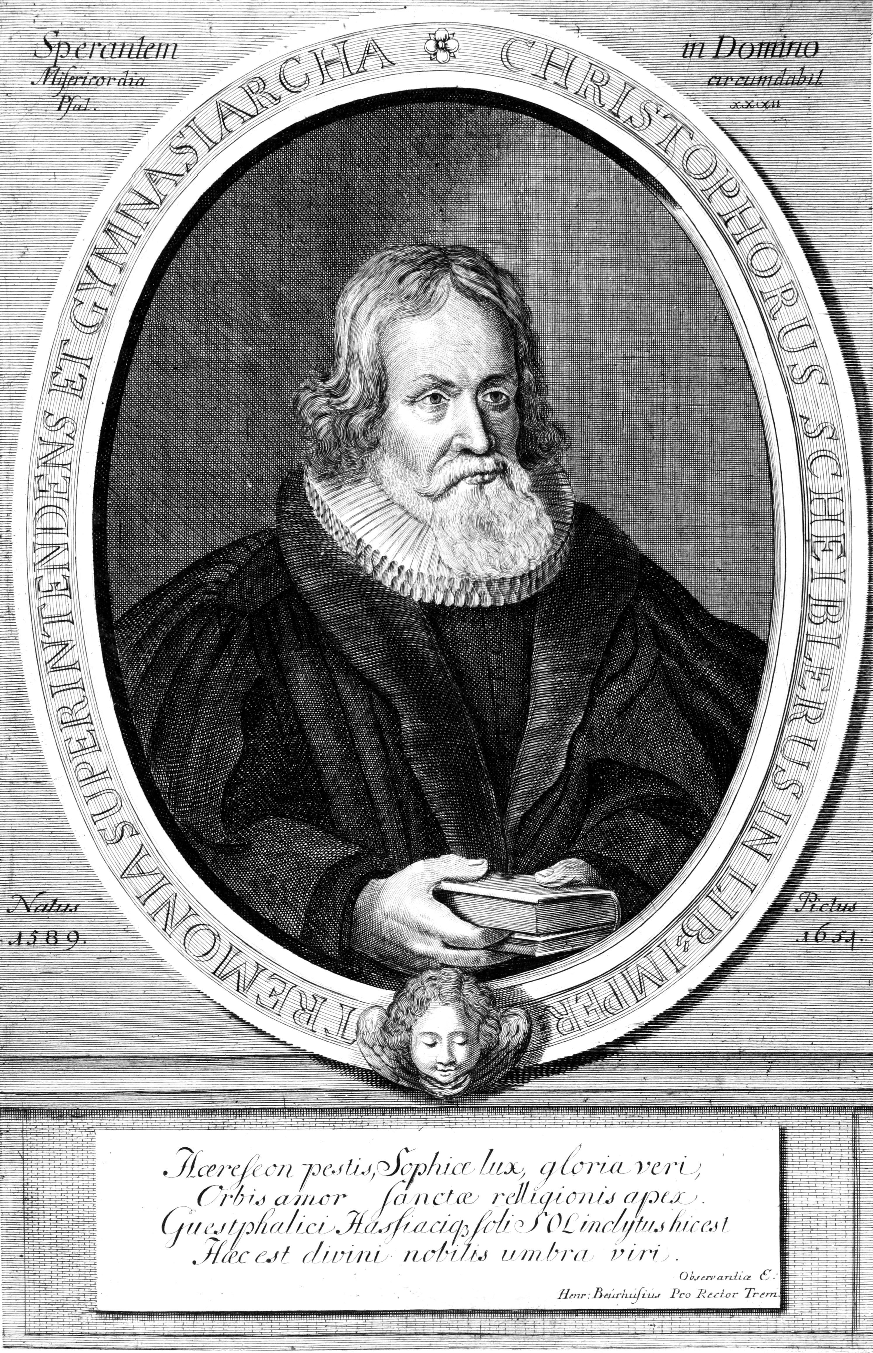 Scan eines Porträts aus dem Scheibler'schen Familienbesitz